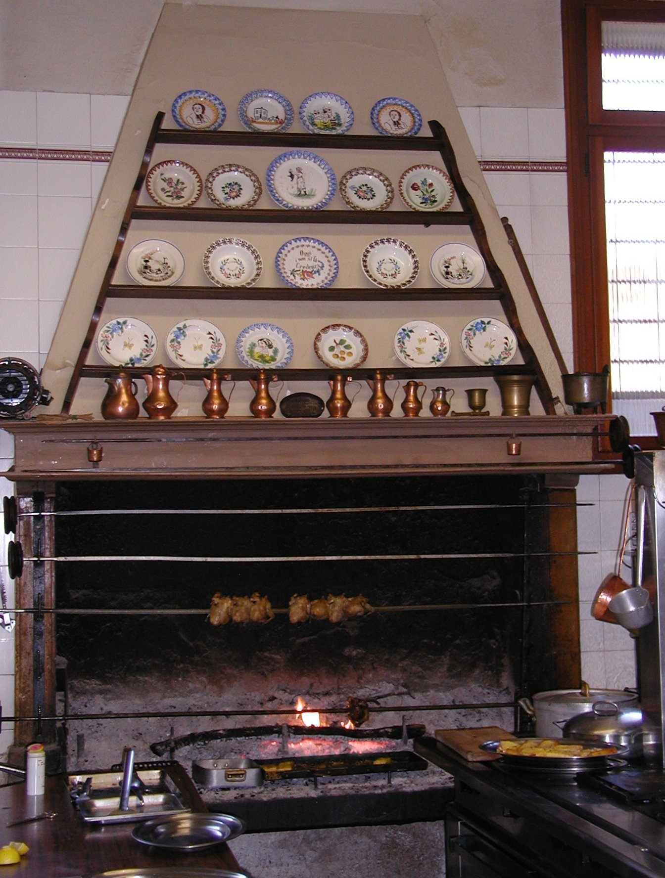 Camino con spiedo di Toresan durante la cottura